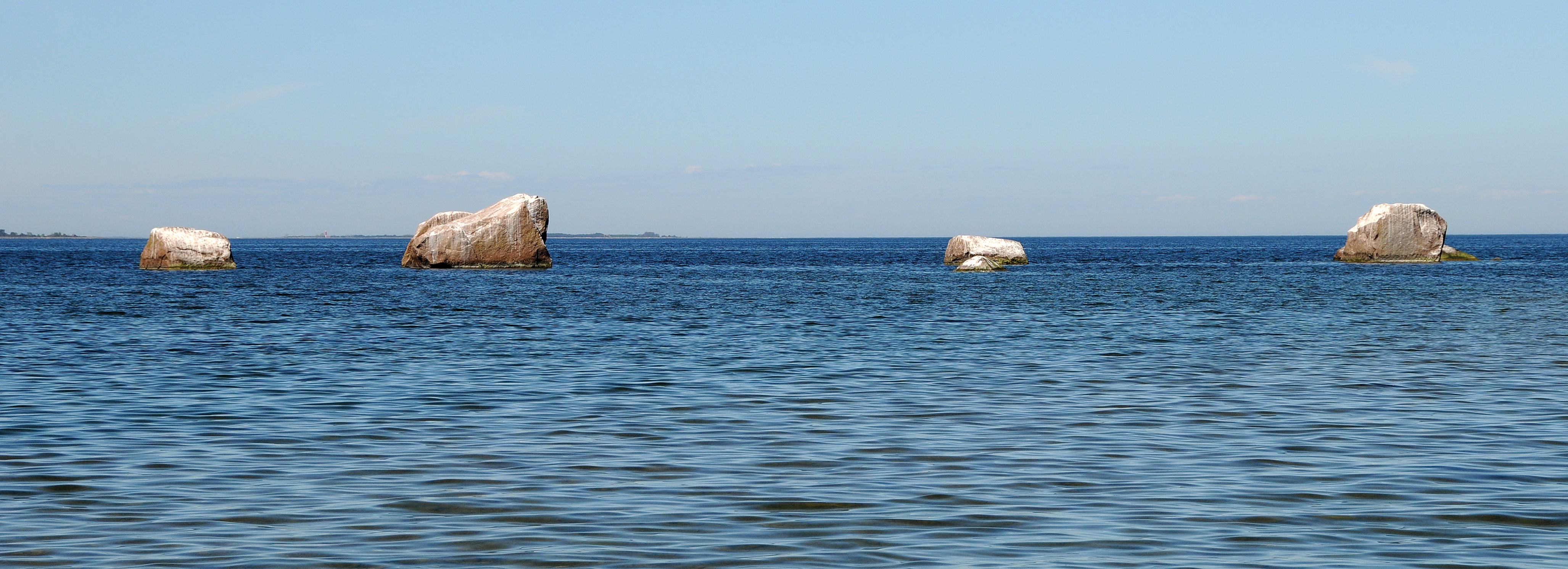 Landvaotsa hiidrahnud